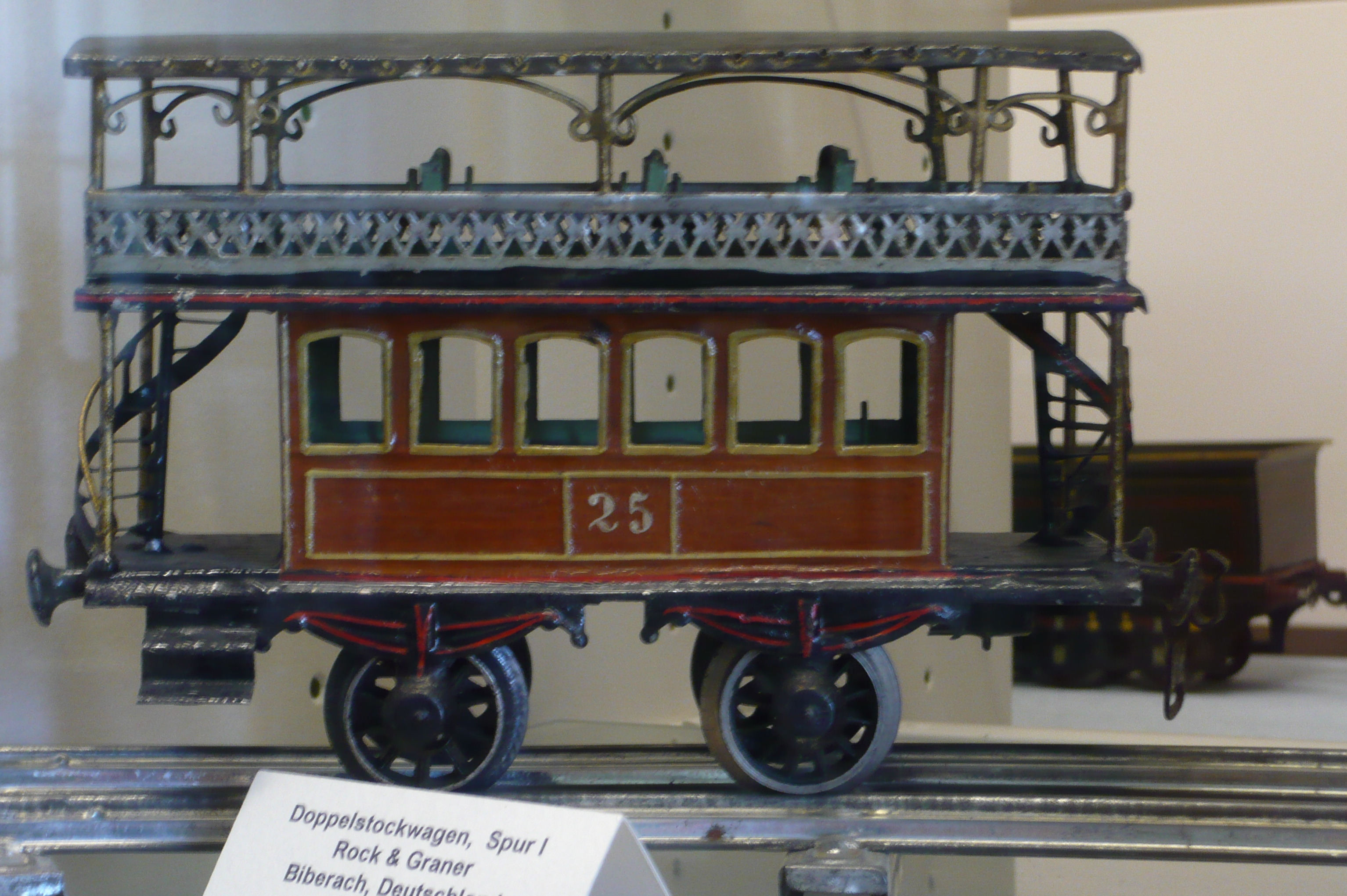 Doppelstockwagen für Spur I, gefertigt um 1895 von Rock & Graner, aufgenommen im Zürcher SpielzeugmuseumNative nameZürcher SpielzeugmuseumLocationZürich, SwitzerlandCoordinates47° 22′ 23.15″ N, 8° 32′ 23.22″ EEstablished1956WebsiteZürcher Spielzeugmuseum